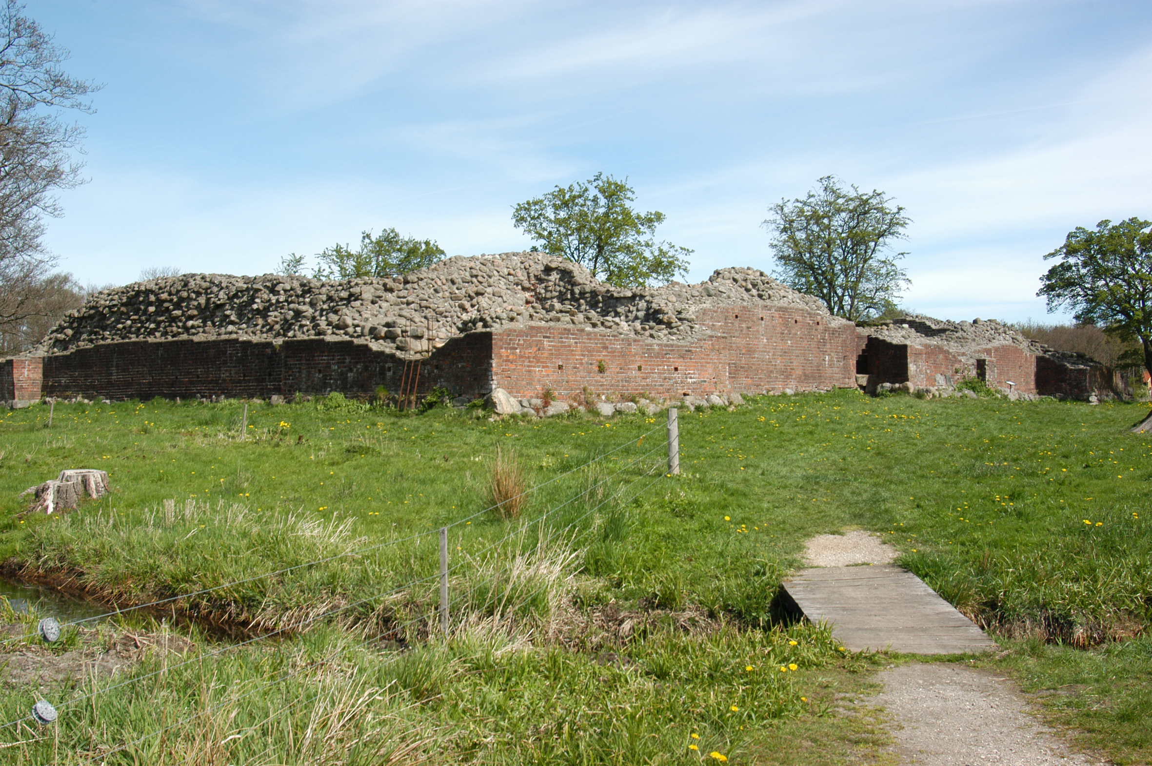 Gurre Slot - Ruine de l'ancien château de Valdemar à Gurre-Danemark